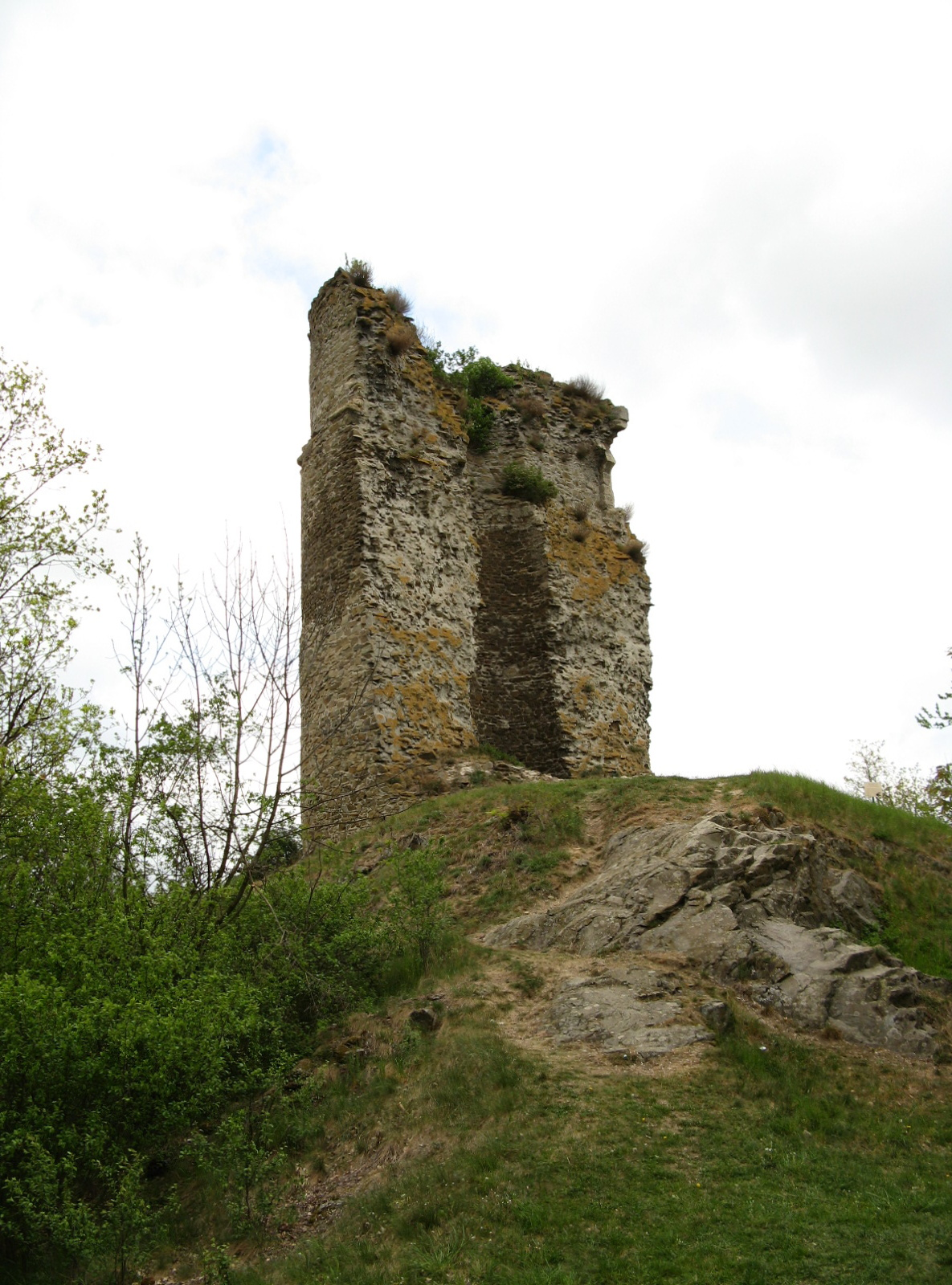 Dolní hrad, zřícenina (Dolní Otaslavice), nad říčkou Otaslávkou, Dolní Otaslavice